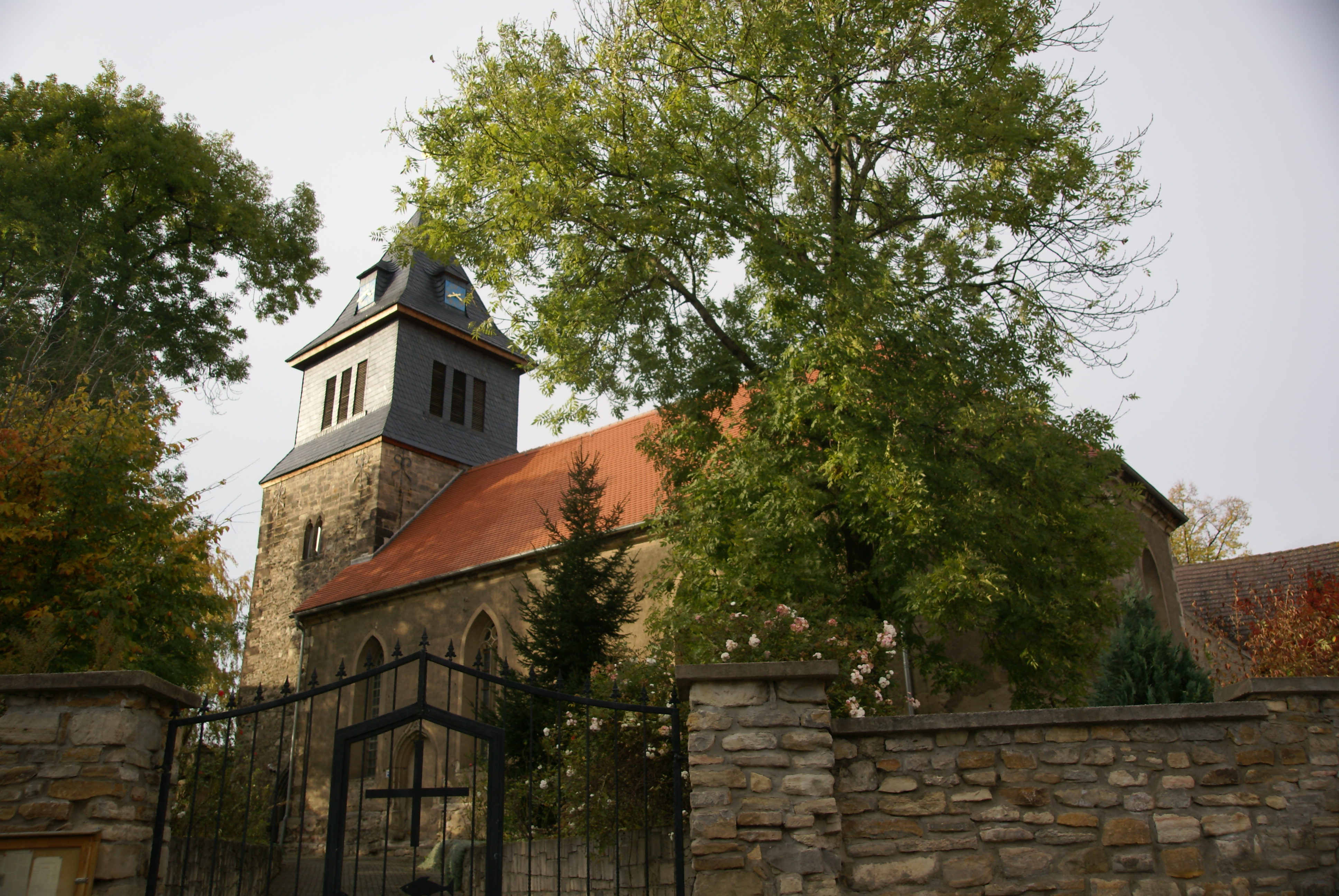 die Dorfkirche von Wansleben am See im Landkreis Mansfeld-Südharz